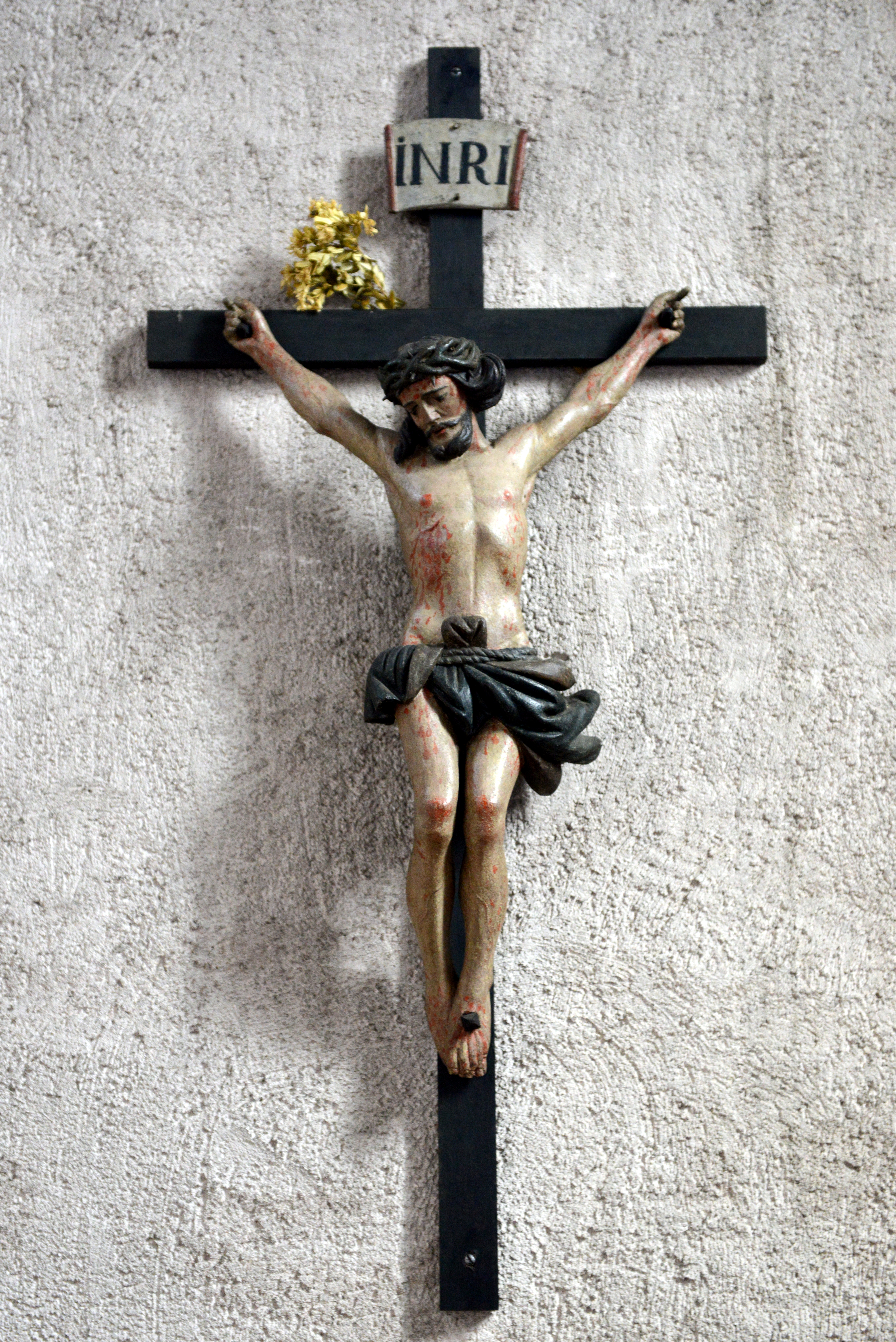 Kruzifix am Chouer vun der Kierch zu Waldbriedemes.